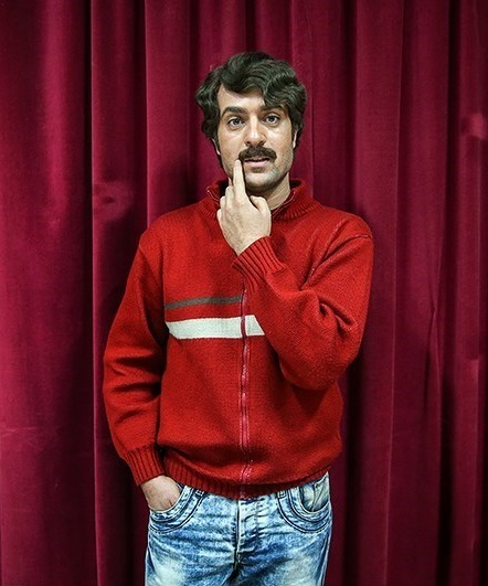 ارسطو عامل